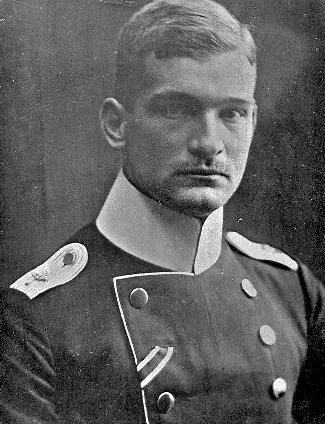 Der erfolgreiche Kampfflieger Leutnant Mulzer, welcher kürzlich den Orden "Pour le mérite" erhielt